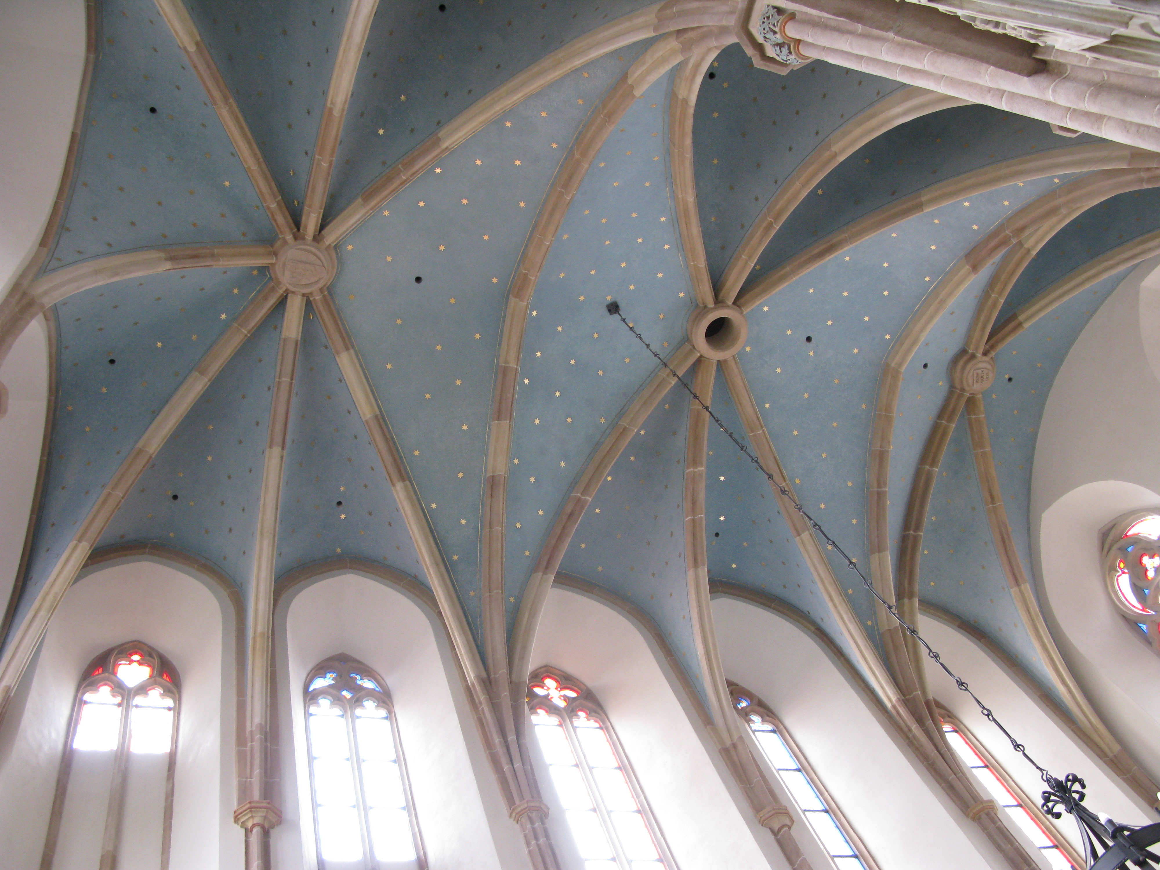 Zaklenutí kostela